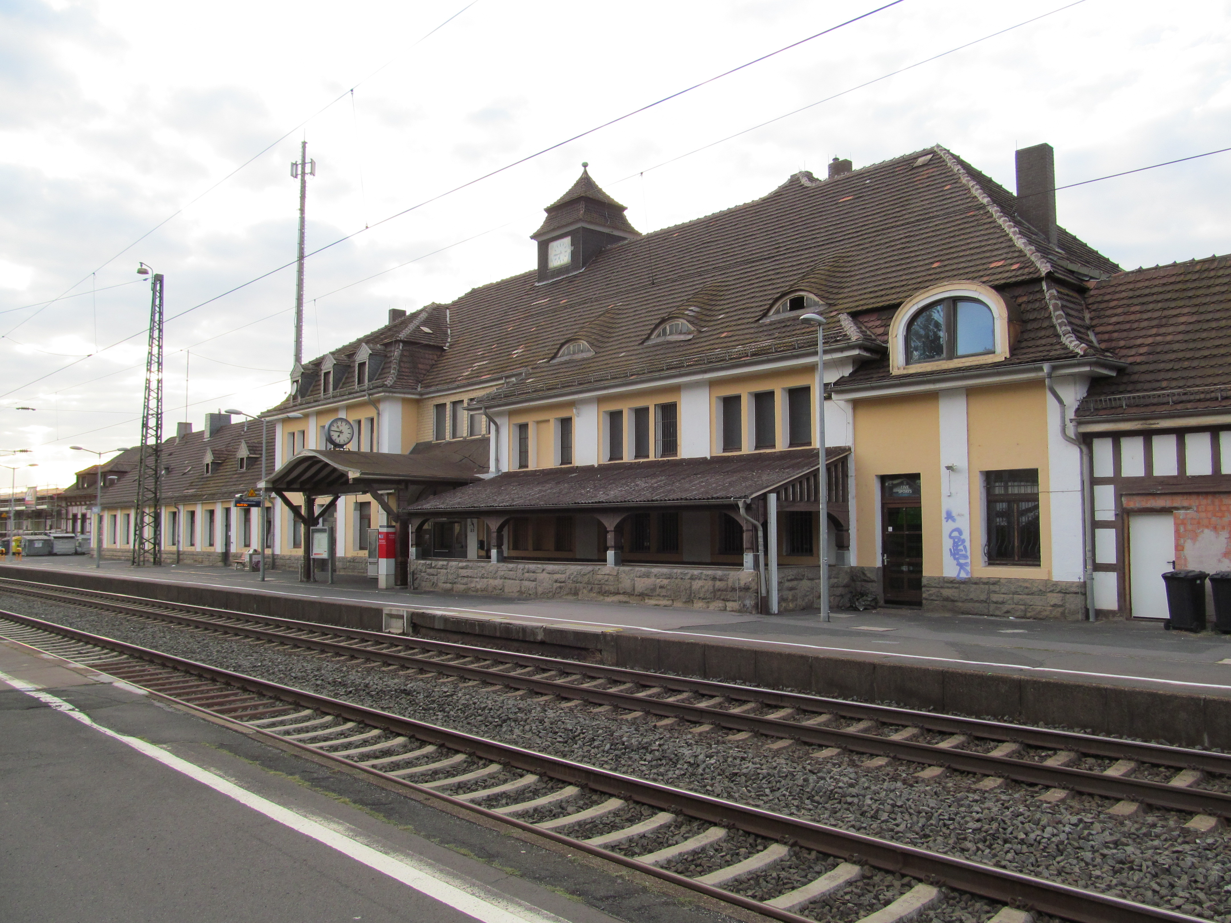 Bild vom Mittelbahnsteig auf das Bahnhofsgebäude von Treysa